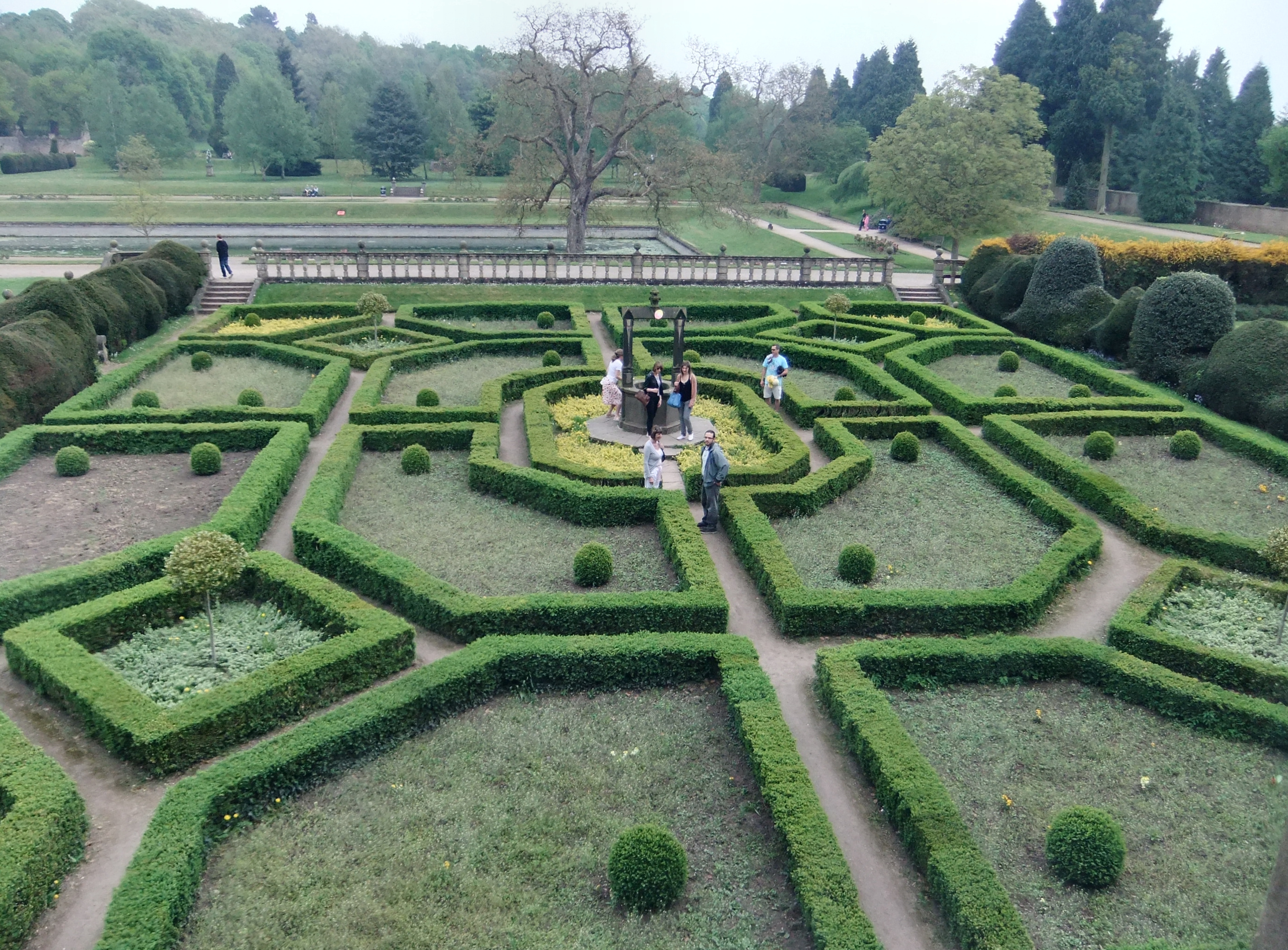 Spanischer Garten von Newstead Abbey